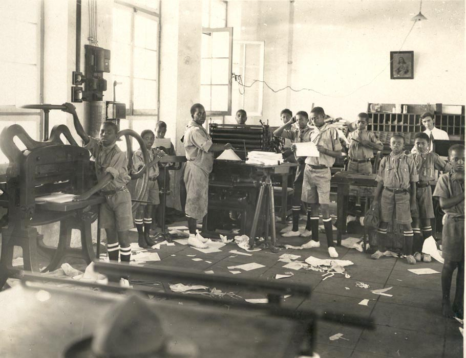 Oficina de Tipografia da Escola de Artes e Ofícios